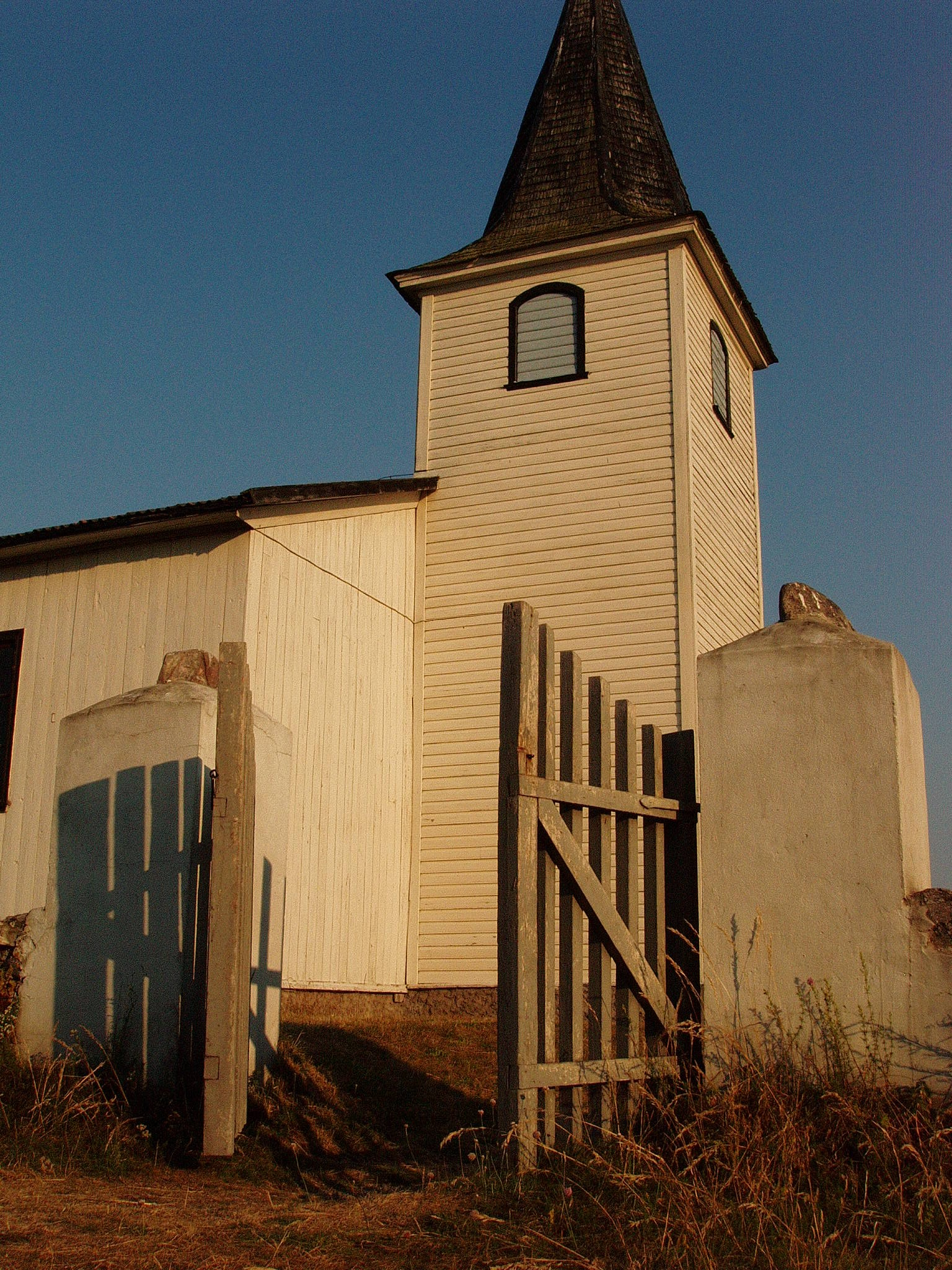 Prangli Laurentsiuse kirik